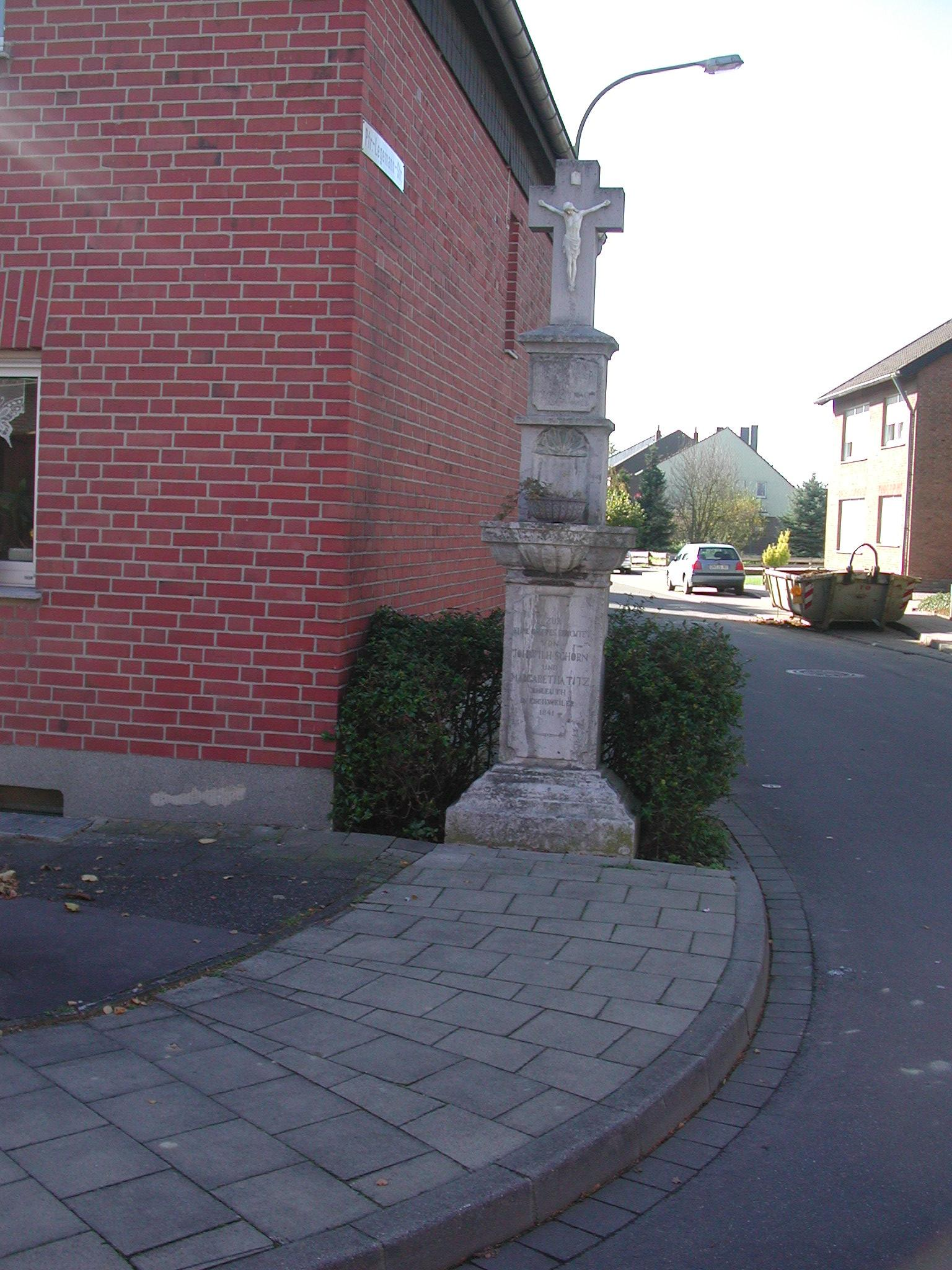 Das Kreuz in der Schmiedegasse/Ecke Pfarrer-Legemann-Straße in Eschweiler über Feld